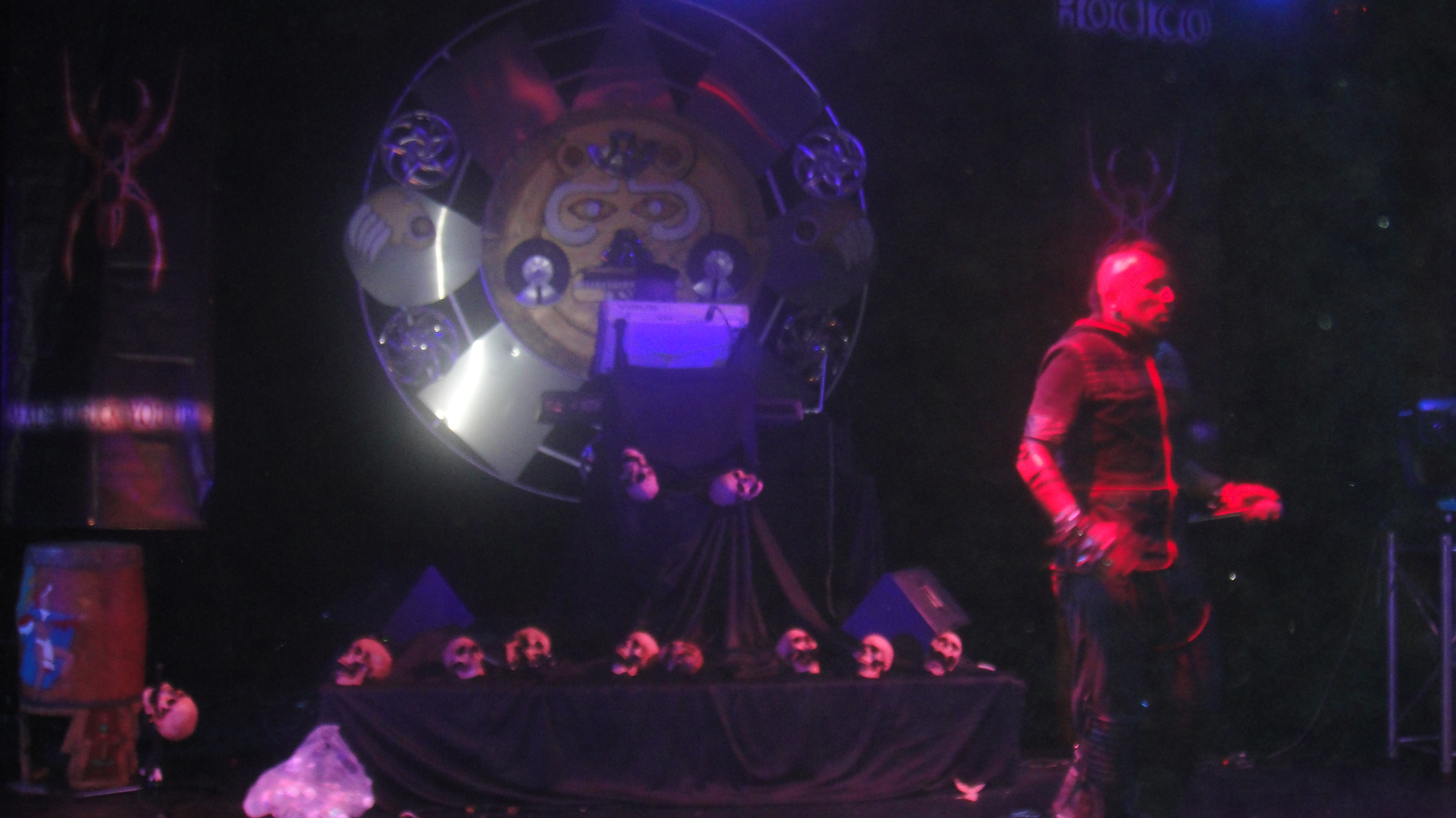 Hocico's pic shot live at Lunario del Auditorio Nacional, México City